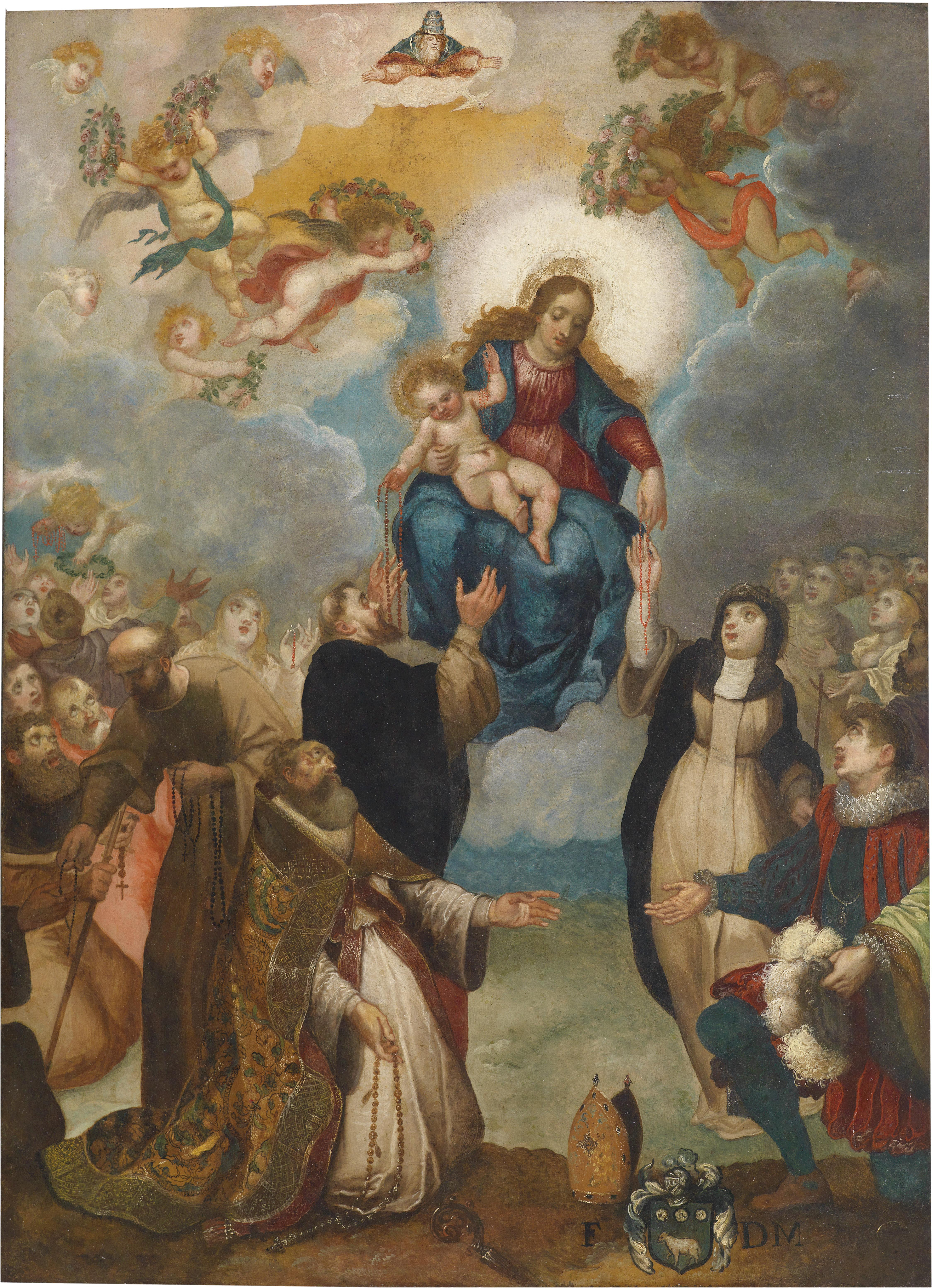 Madonna mit Kind, der heiligen Katharina einen Rosenkranz überreichend, darunter ein knieender Bischof und sein Wappen, Öl auf Kupfer, 44,5 x 32,5 cm